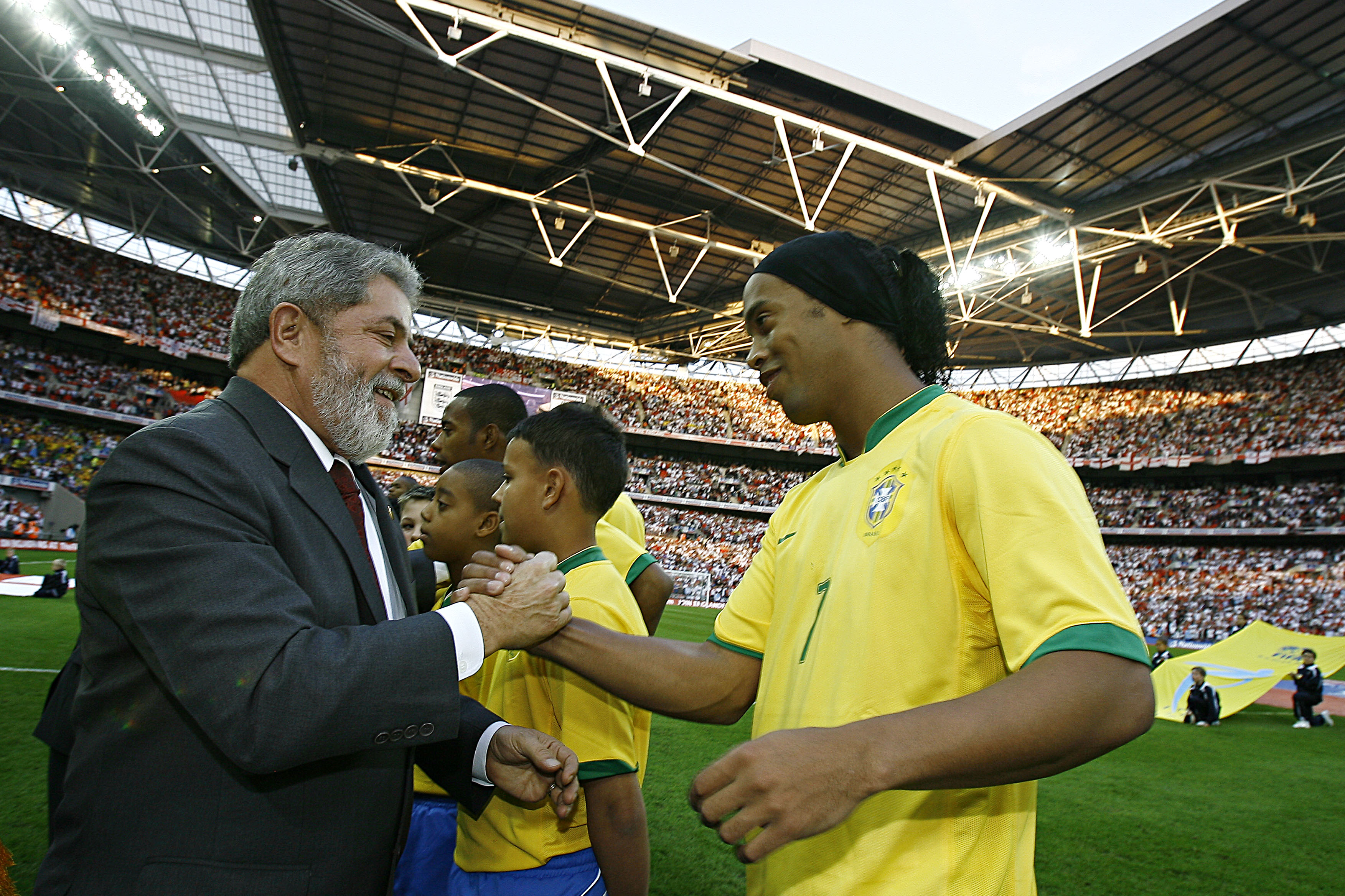 Londres (Inglaterra) - O presidente Luiz Inácio Lula da Silva cumprimenta o jogador Ronaldinho Gaúcho antes do jogo amistoso entre as seleções de futebol do Brasil e da Inglaterra. Foto: Ricardo Stuckert/PR